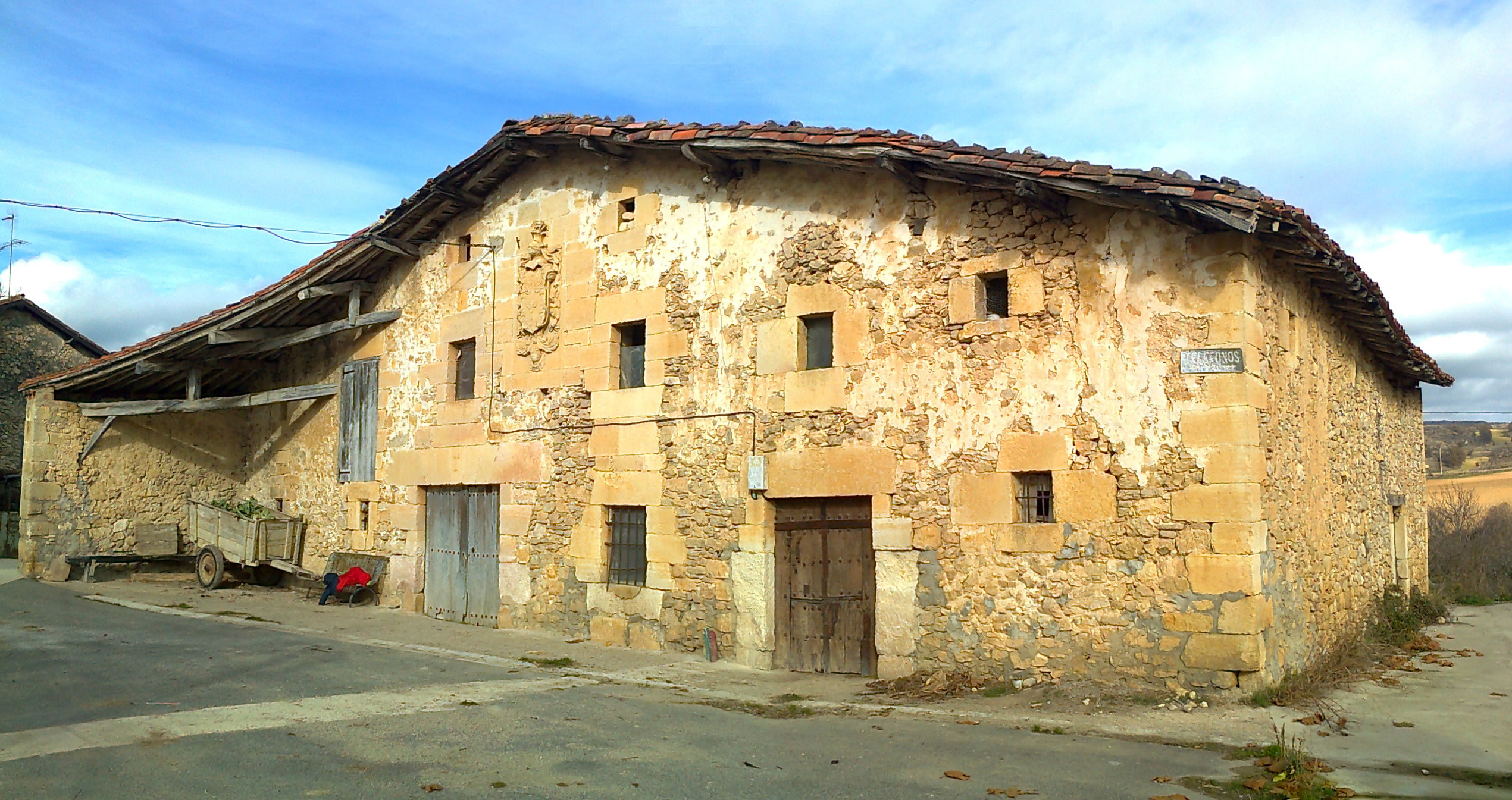 Urarteko baserria